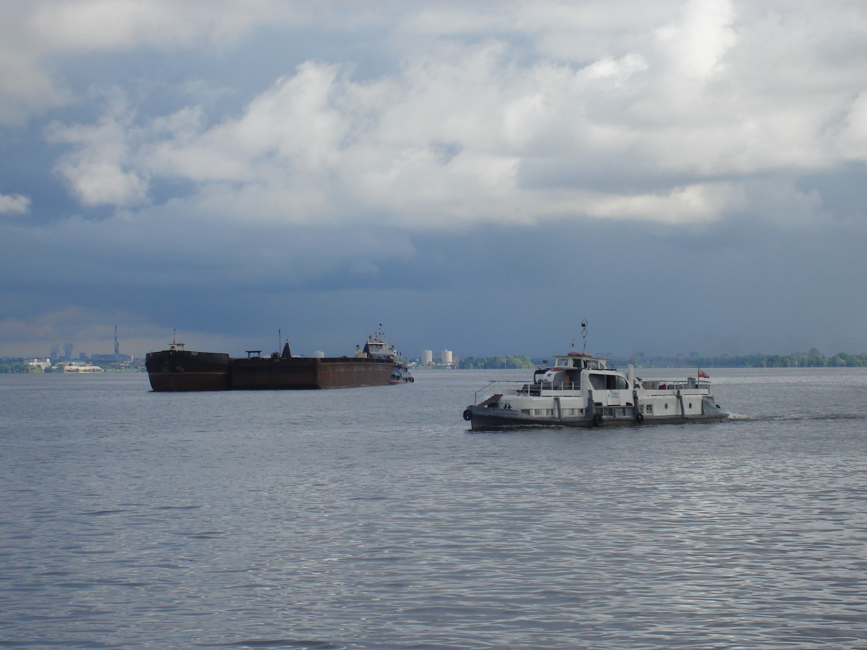 Volga near Kazan